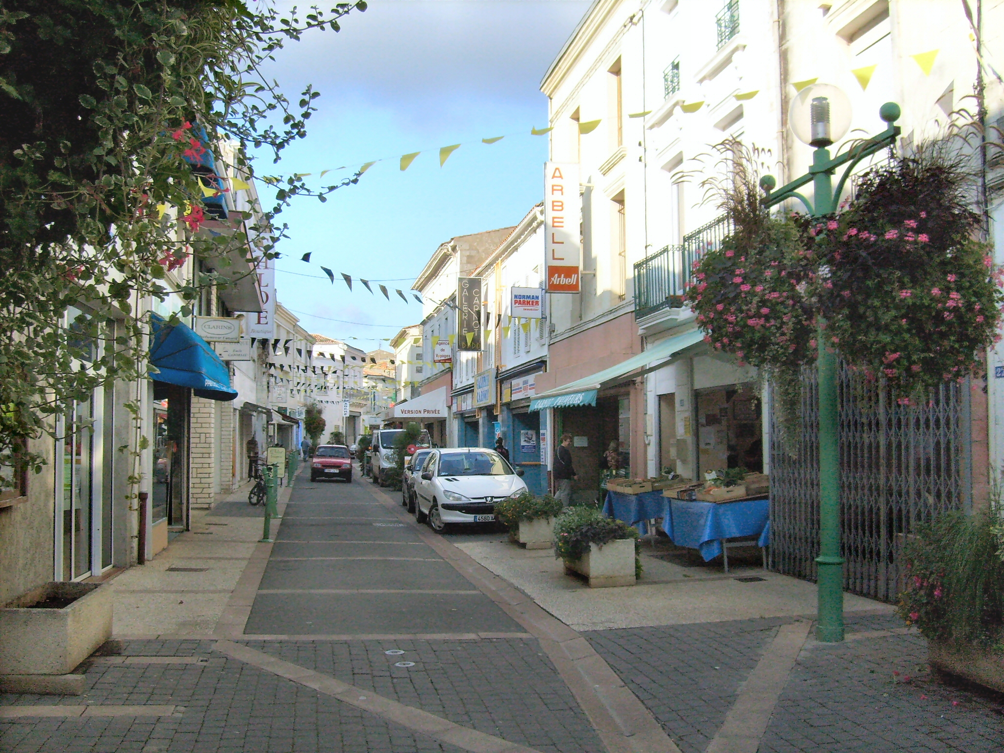 La rue Carnot à Saujon